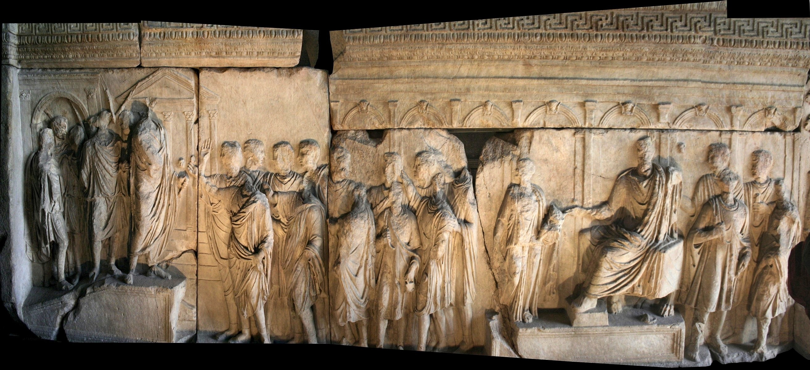 Fragment des Plutei Traiani : L'empereur se tient sur les Rostres et s'adresse à une assemblée. En face, une statue de Trajan reçoit les remerciements d'une mère pour l'institution des Alimenta.